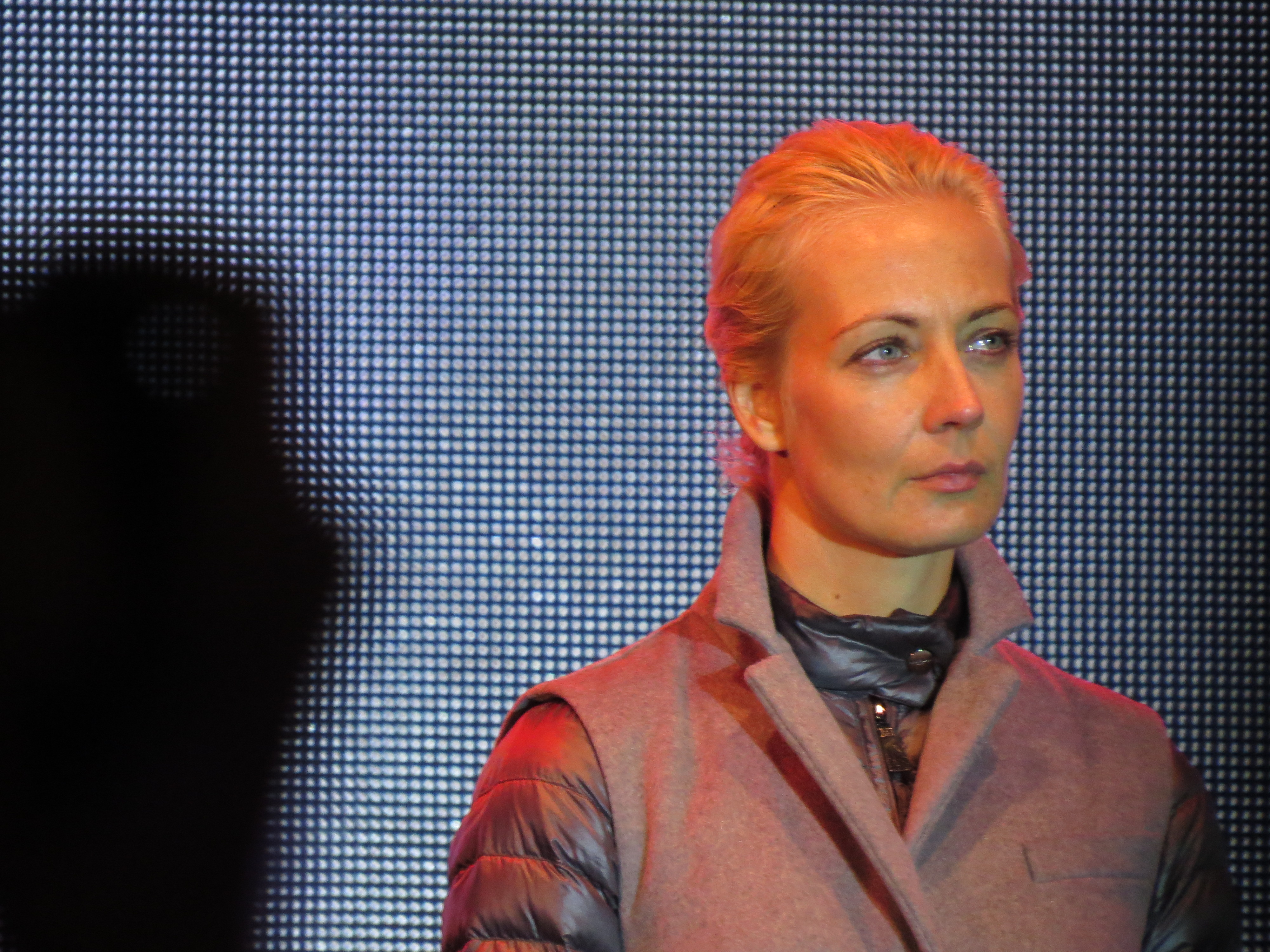 Юля Навальная на концерте-митинге в поддержку кандидата в мэры Москвы Алексея Навального на проспекте Сахарова 6 сентября 2013 года